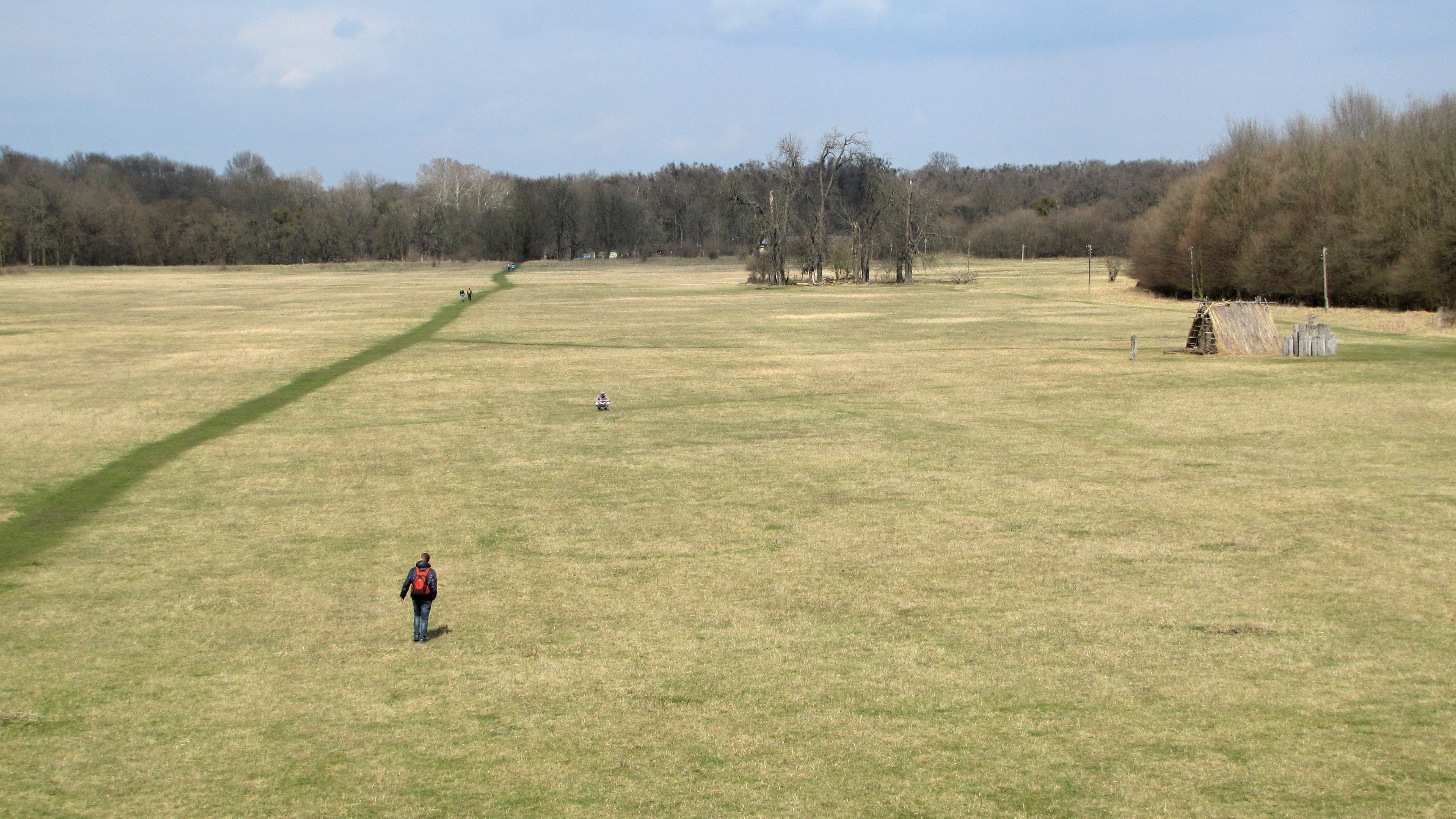 Bývalé hradiště Pohansko u Břeclavi